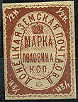 Земская марка Старобельского уезда Екатеринославского наместничества номиналом полкопейки